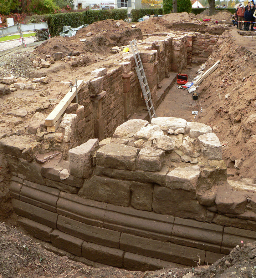 Stiftskrypta Nörten, im Vordergrund die Ostwand und dahinter die Südwand